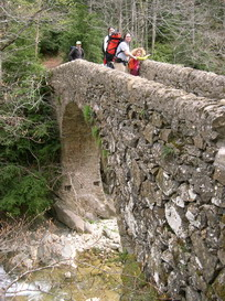 Pont de Salgueda. (Vidrà). Object location42° 06′ 54.59″ N, 2° 19′ 09.02″ E